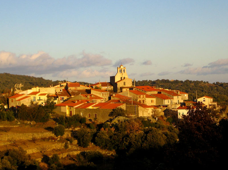 El municipi nord-català d'Arboçols de Conflent.